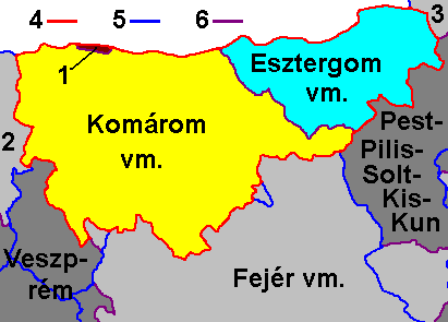 Komárom és Esztergom k.e.e. vármegye kialakítása 1923-ban. 1 Komárom tjv., 2 Győr vm., 3 Hont vm., 4 Komárom és Esztergom k.e.e.vm. 1923-1938, 5 mai megyehatár, 6 megyszűnt 1914-es megyehatár